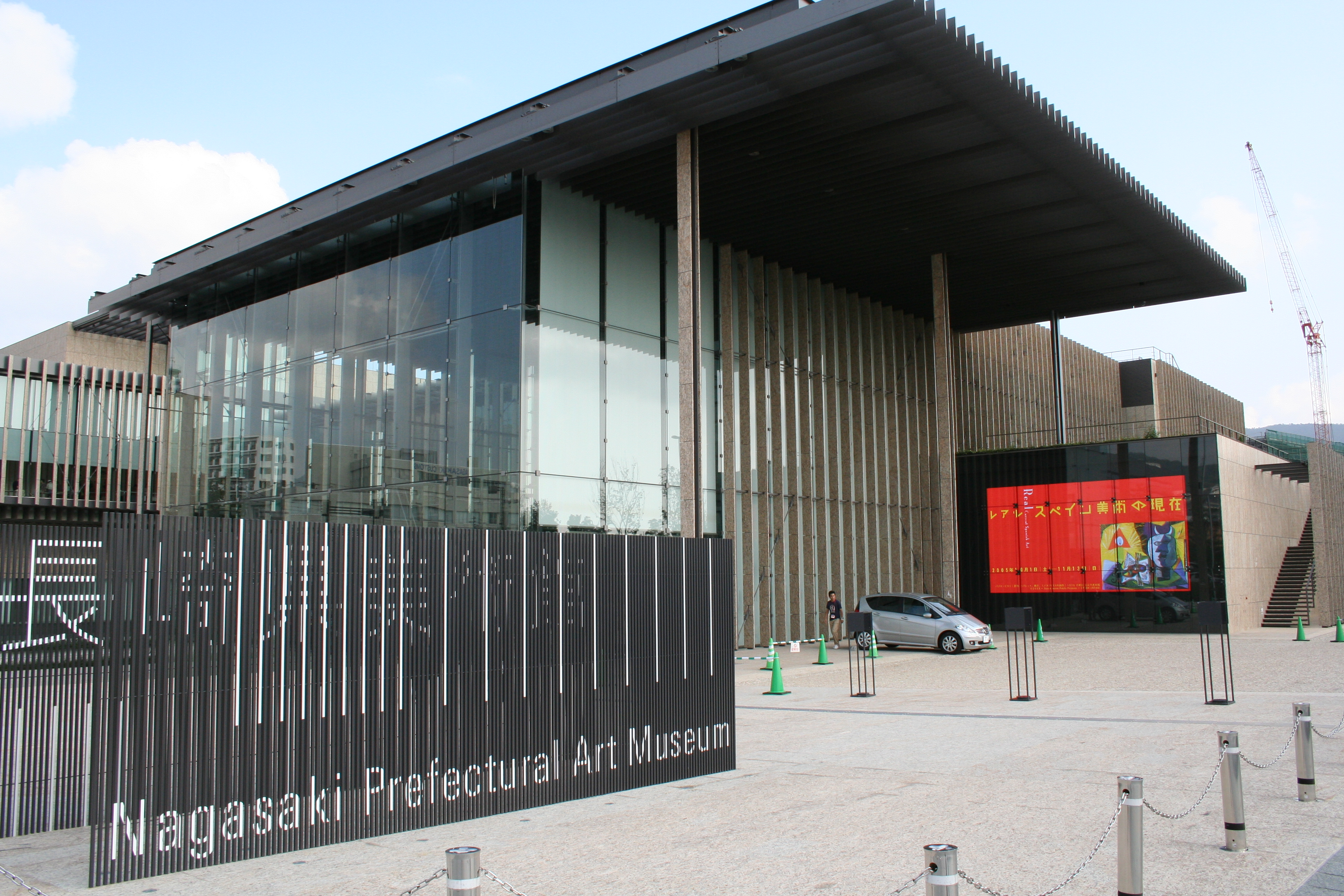 Nagasaki Prefectural Art Museum、Nagasaki, Japan. Opened in 2005. 長崎県美術館